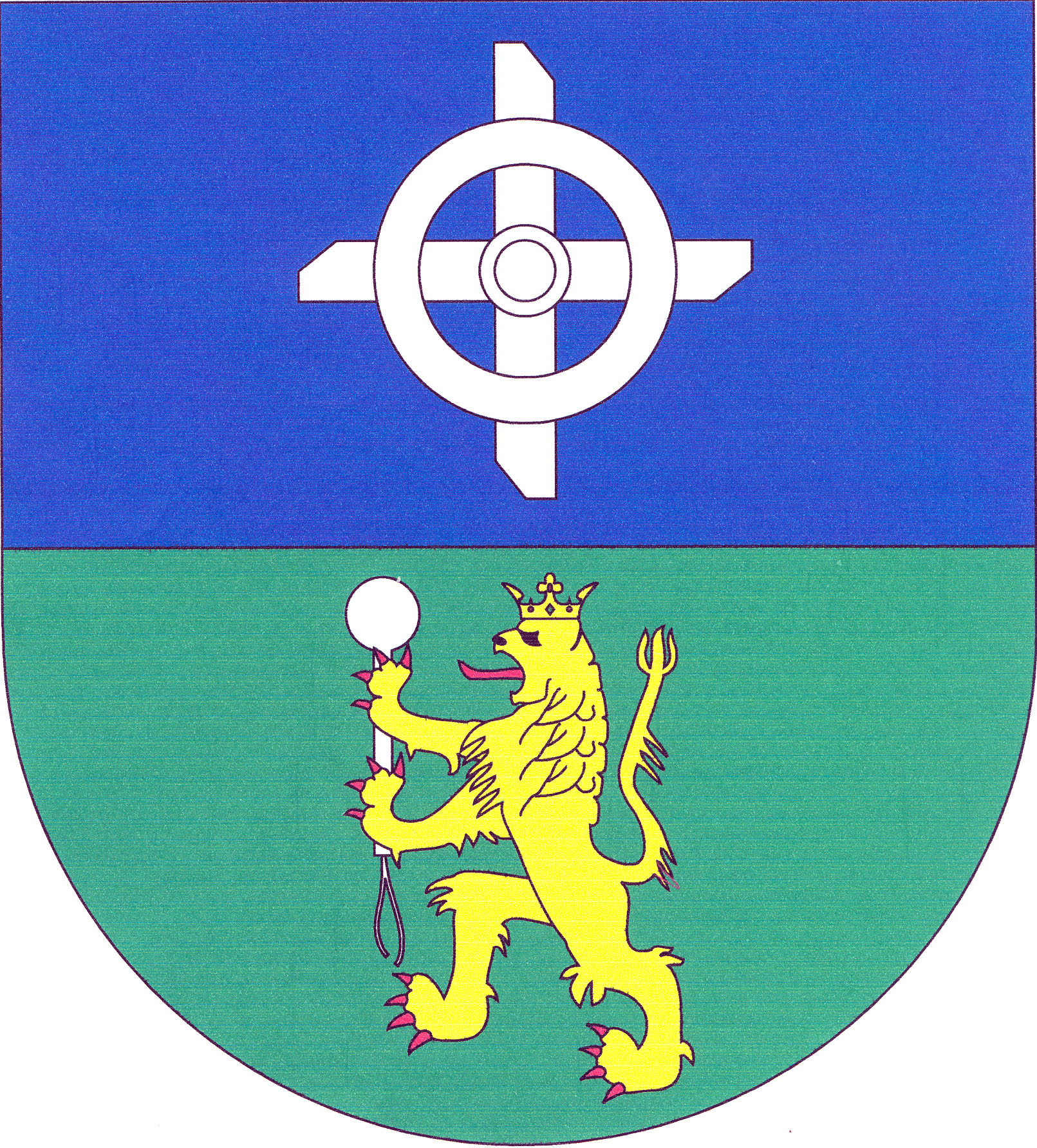 Znak obce Hamry (okres Klatovy)